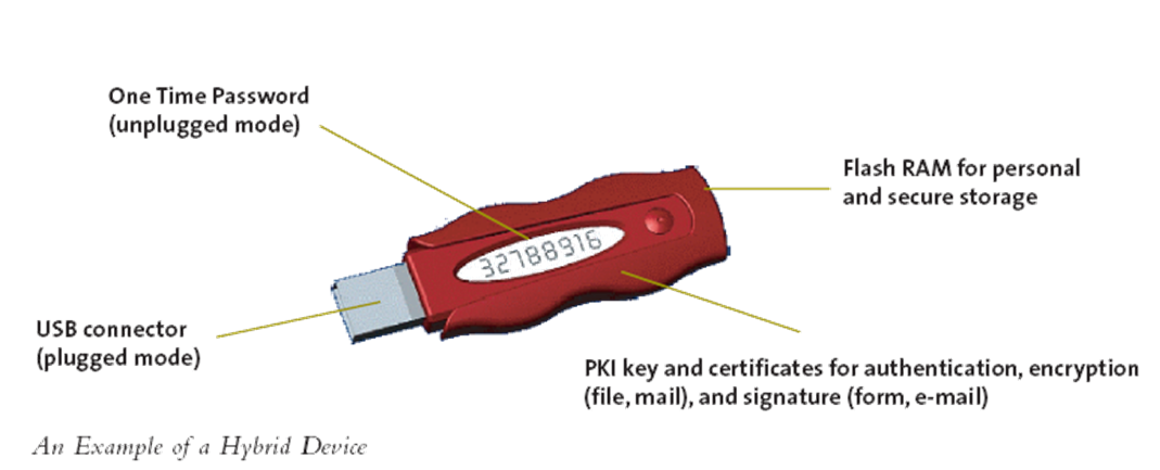 Token Hybride